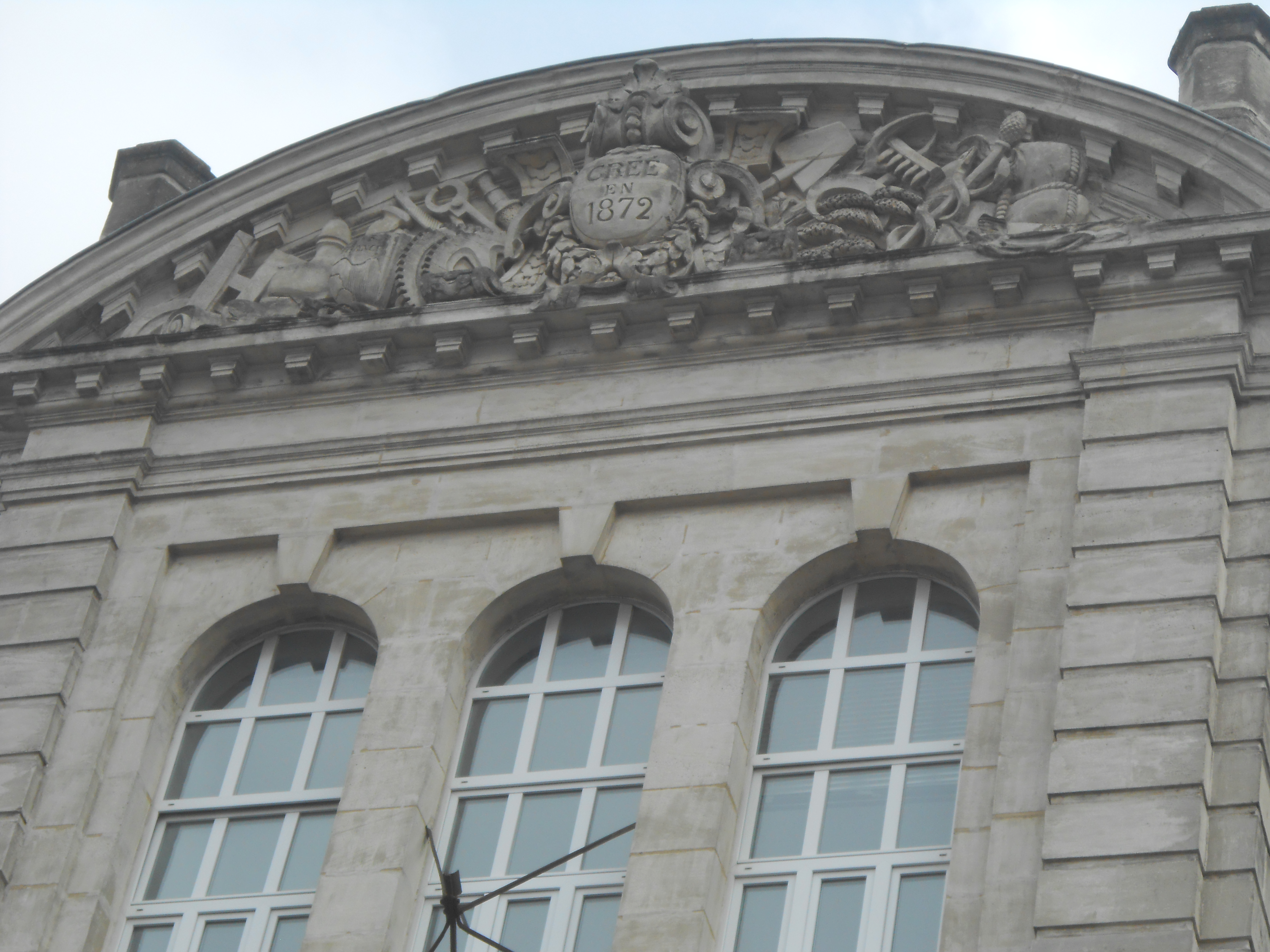 Fronton IDN, 17 rue Jeanne d'Arc, F-59000 Lille, France